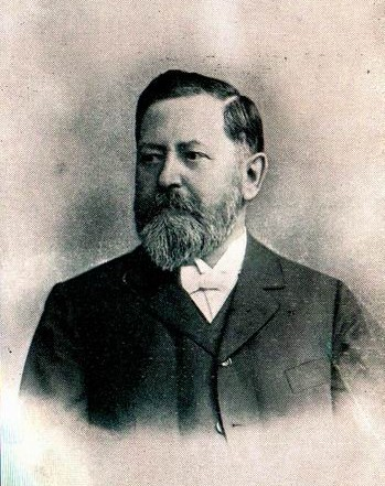 Alois Strnad (1852 - 1911), Český matematik a geometr.